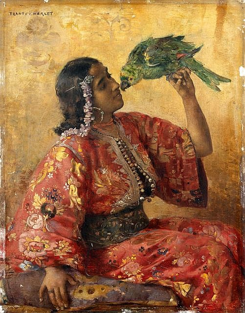 Jeune marocaine au perroquet